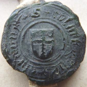 Sceau de Colart de Hennin sur une lettre de l’abbaye d’Anchin le 03.08.1451 (A.D. Nord, 1 H 141 pièce 1513)